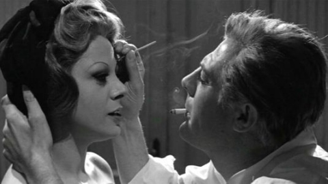 Screenshot del film 8½ (1963)